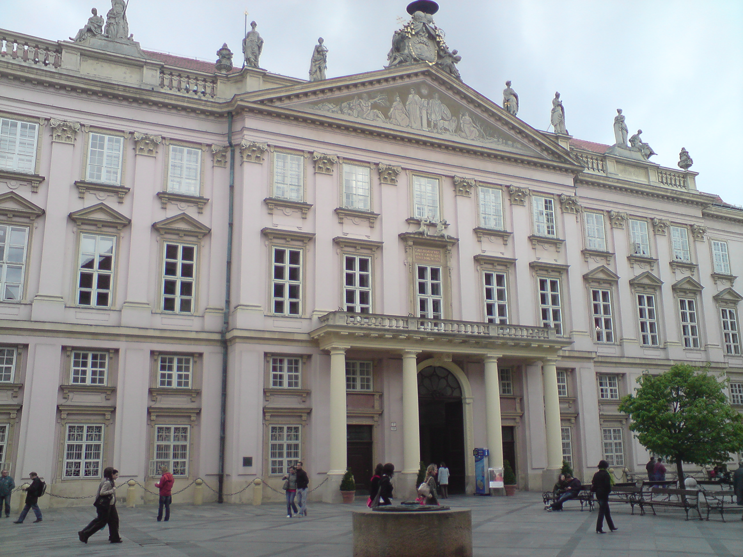 Primaciálny palác, Primaciálne námestie, Bratislava